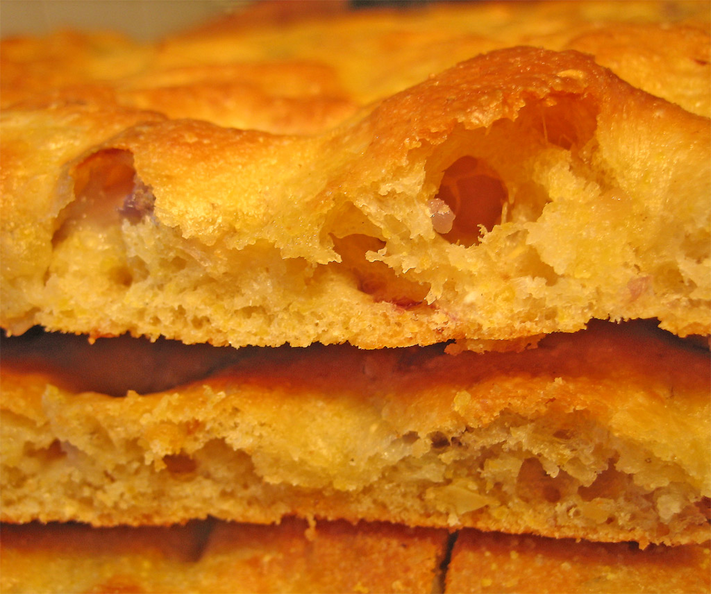 tagli ricetta/recipe sul mio Blog